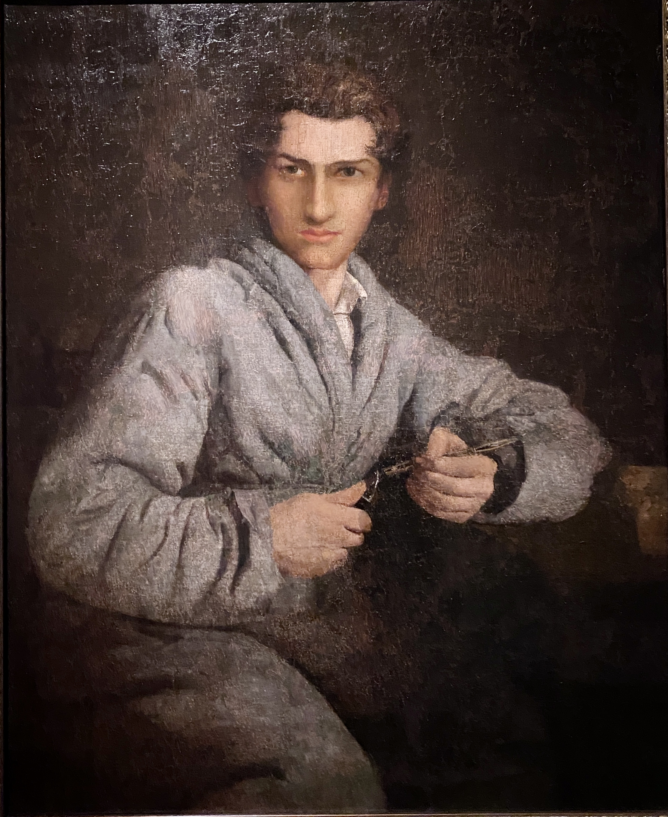 Беларуская (тарашкевіца): Аўтапартрэт Канута Русецкага